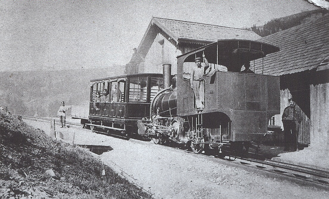 Gemischterzug der ARB bei der Station Klösterli